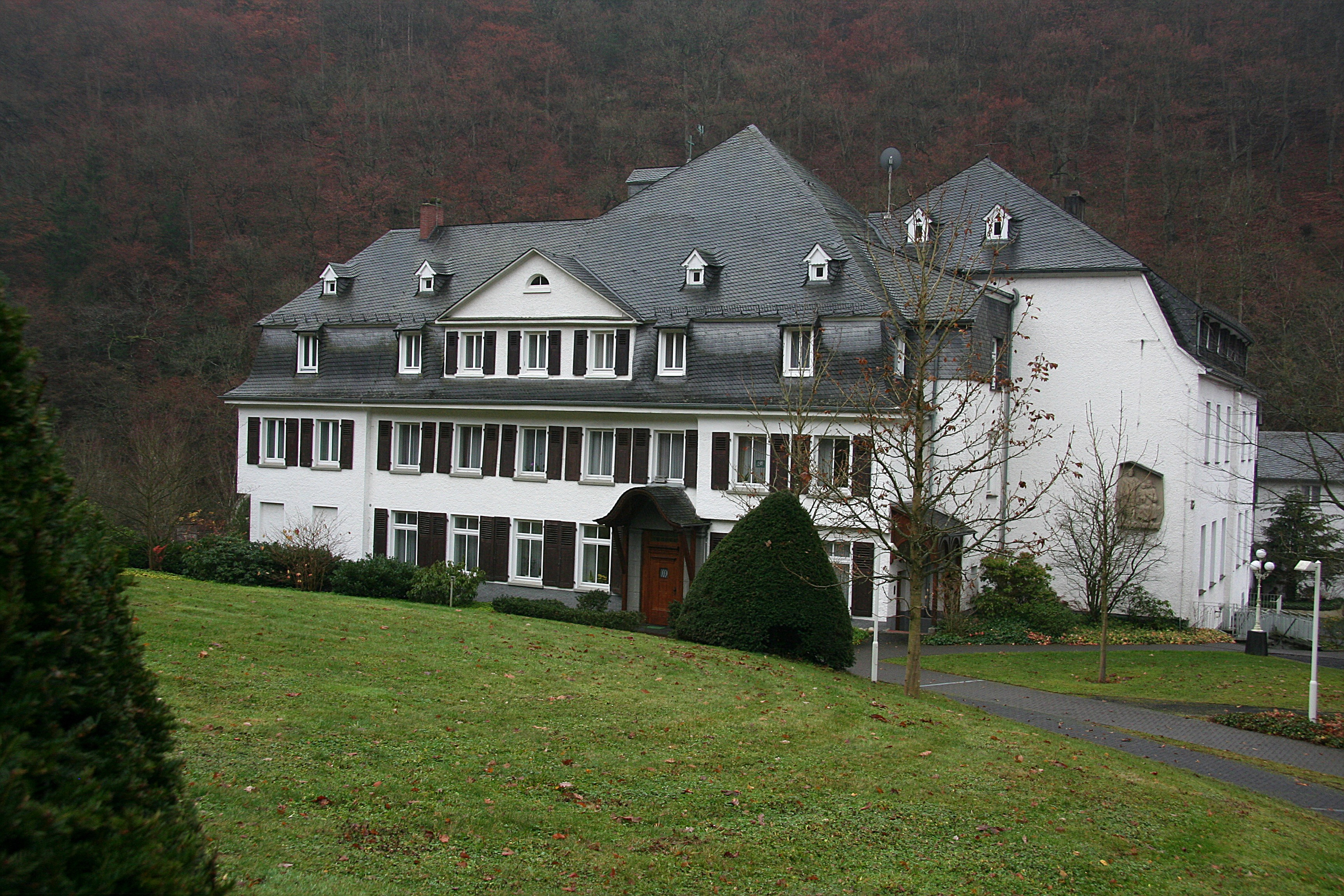 Kloster Helgoland bei Mayen, im Dezember 2010 aufgelöst